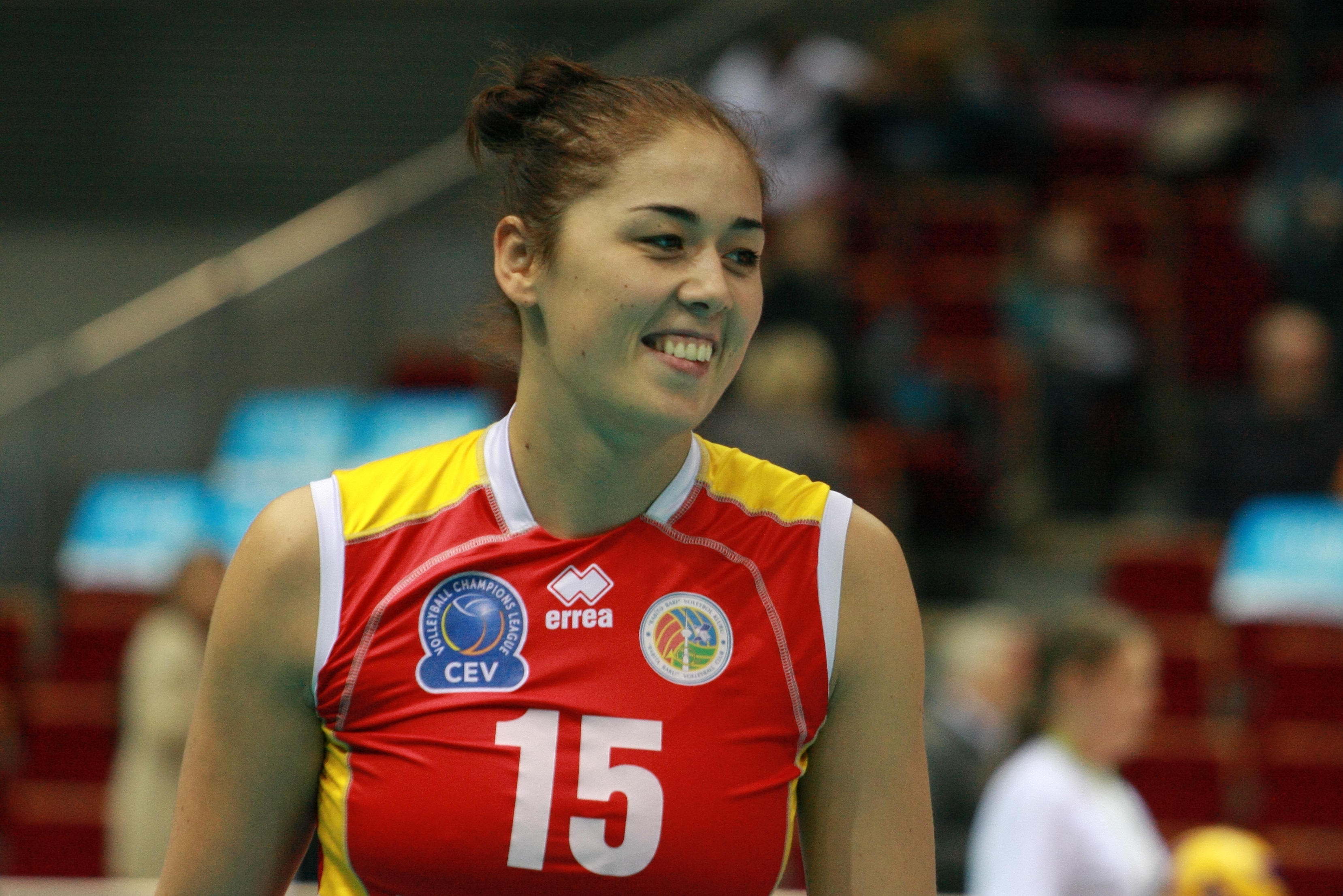 Sanja Starovic